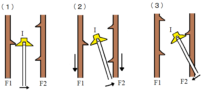 伊能忠敬が使用した垂揺球儀の爪車(F1, F2)と鋼鉄片(I)の動作。大谷亮吉編著『伊能忠敬』岩波書店、1917年、pp.406-407の図をもとに作成。